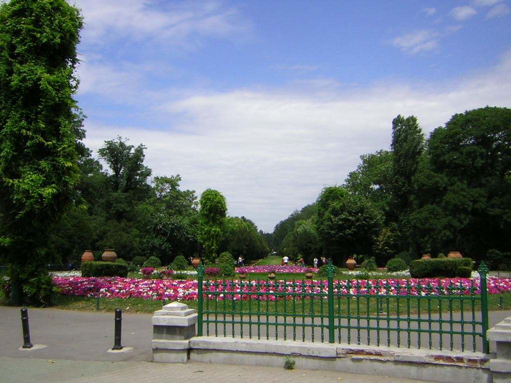 Cismigiu Garden in Summer